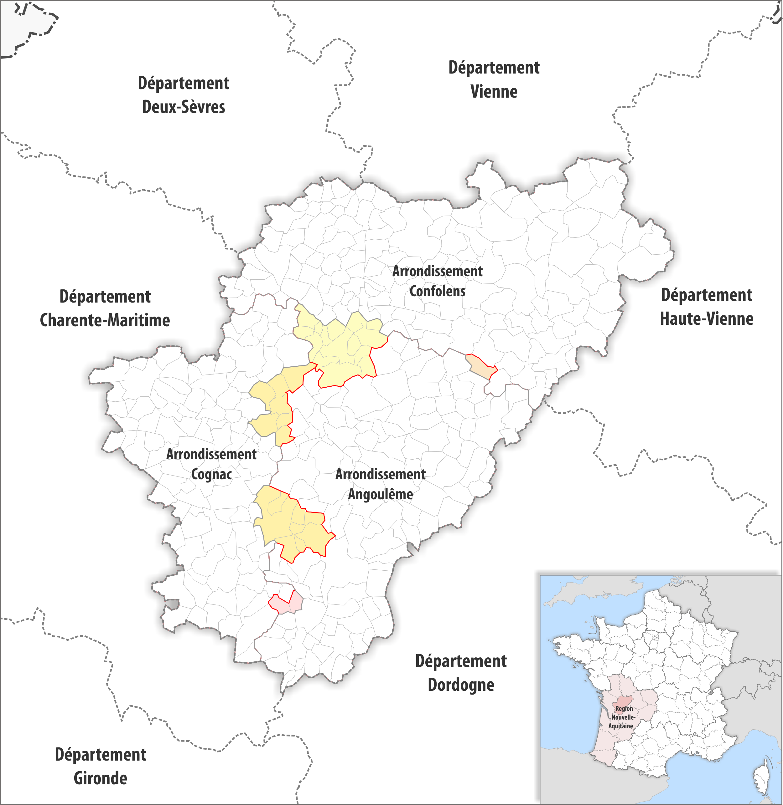 Arrondissements Anpassungen auf 2017 im Departement Charente